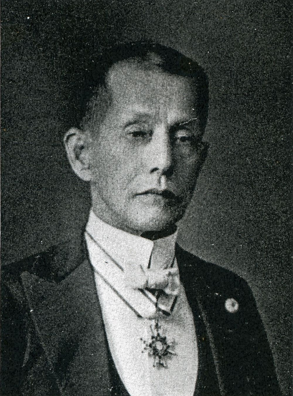 この写真は、八木逸郎（1863-1945）の写真です。